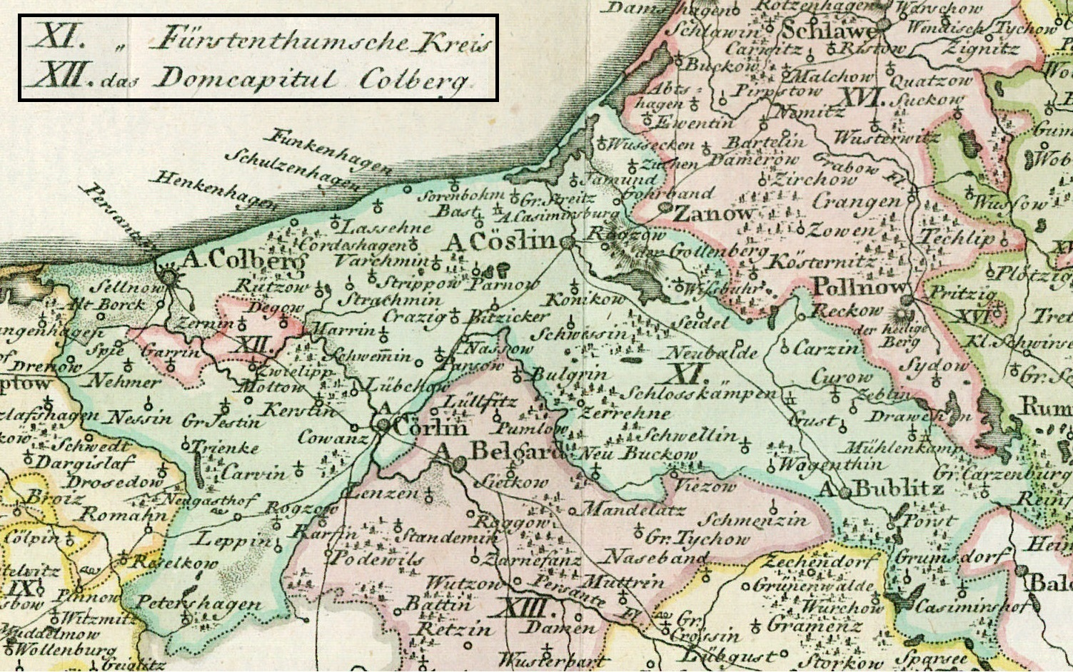 Ausschnitt aus "Landkarte des Herzogtums Vor- und Hinterpommern aus dem Jahr 1794